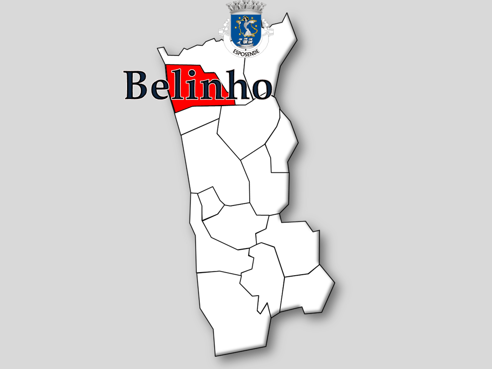 Censos 1864/2011